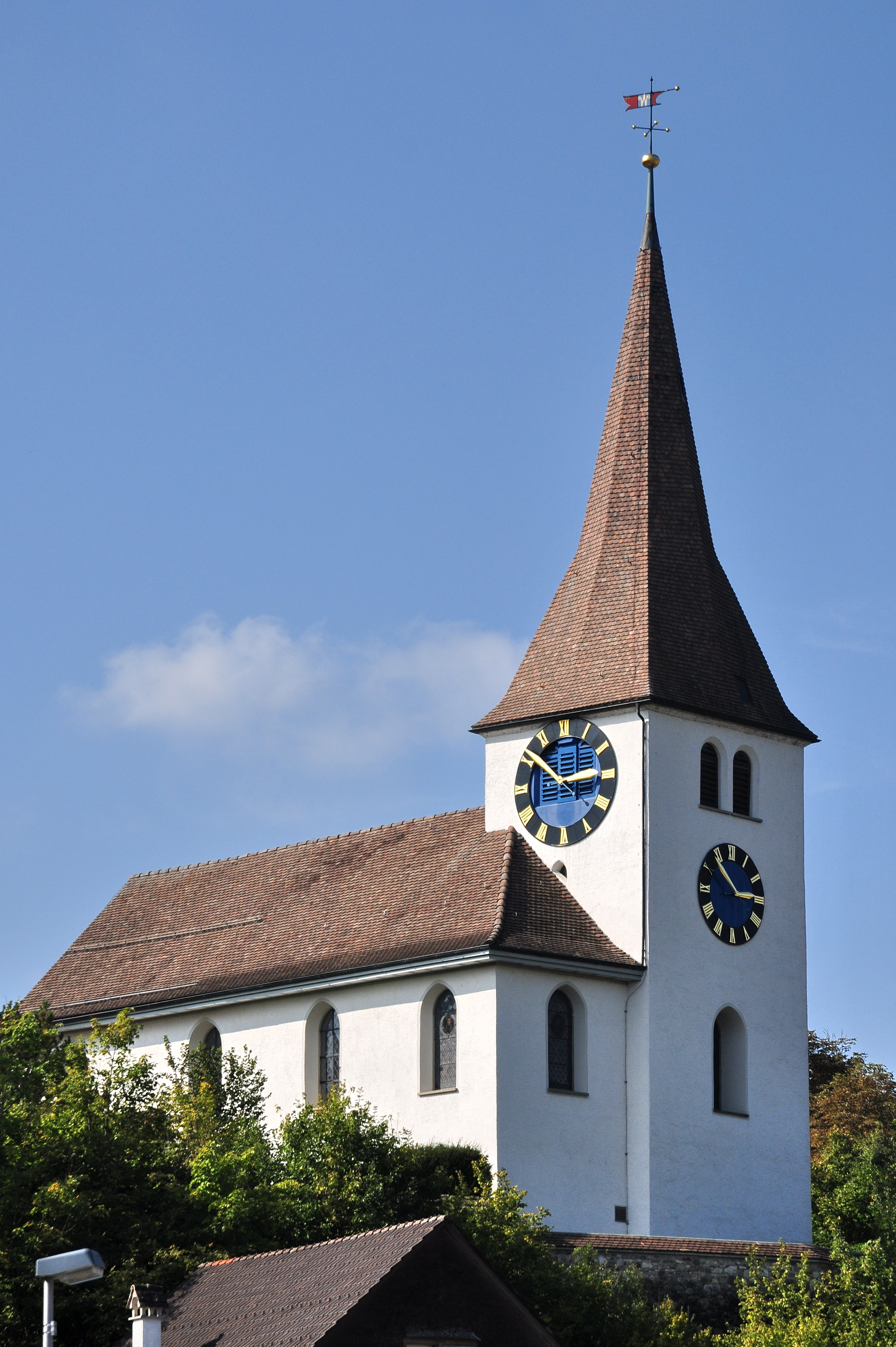 Reformierte Kirche in Wila (Switzerland)